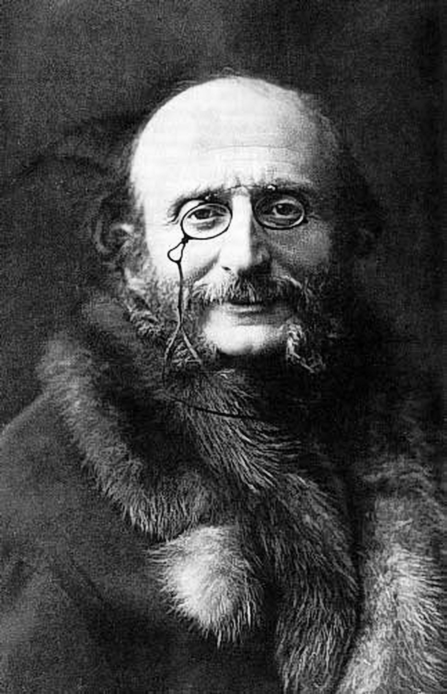 Jacques Offenbach